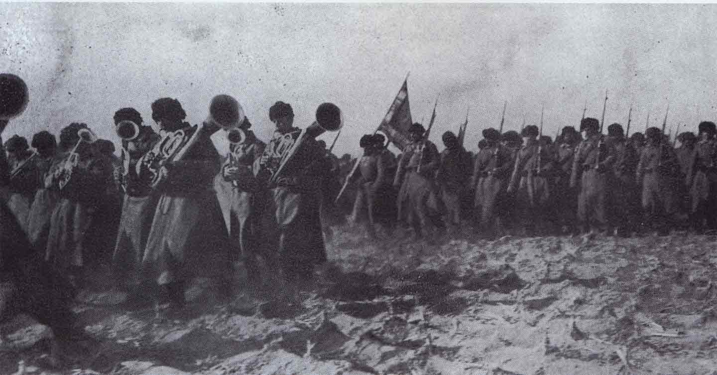 Podil 55th Regiment during the Battle of Mukden. Подольский 55-й пехотный полк под Мукденом на полях Маньчжурии, Японская война.